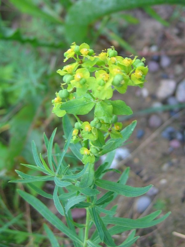 Esels-Wolfsmilch (Euphorbia esula)